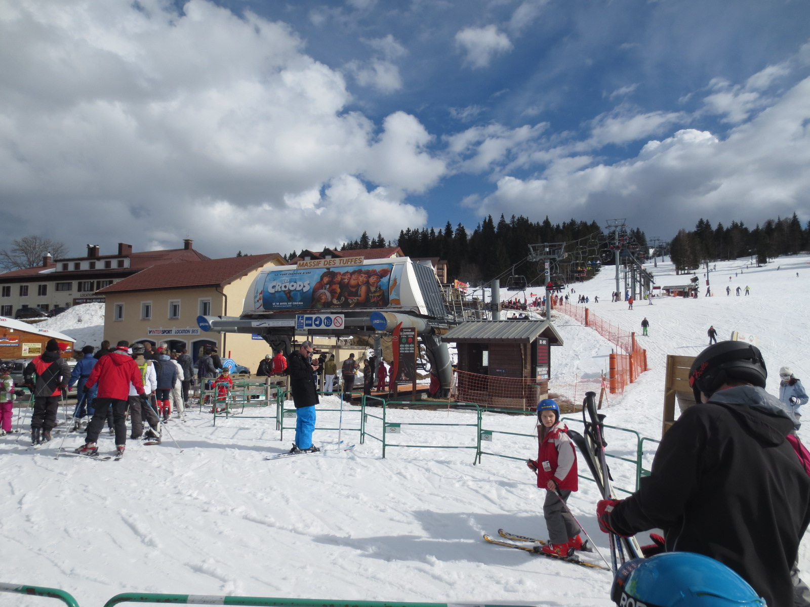 Station des Rousses